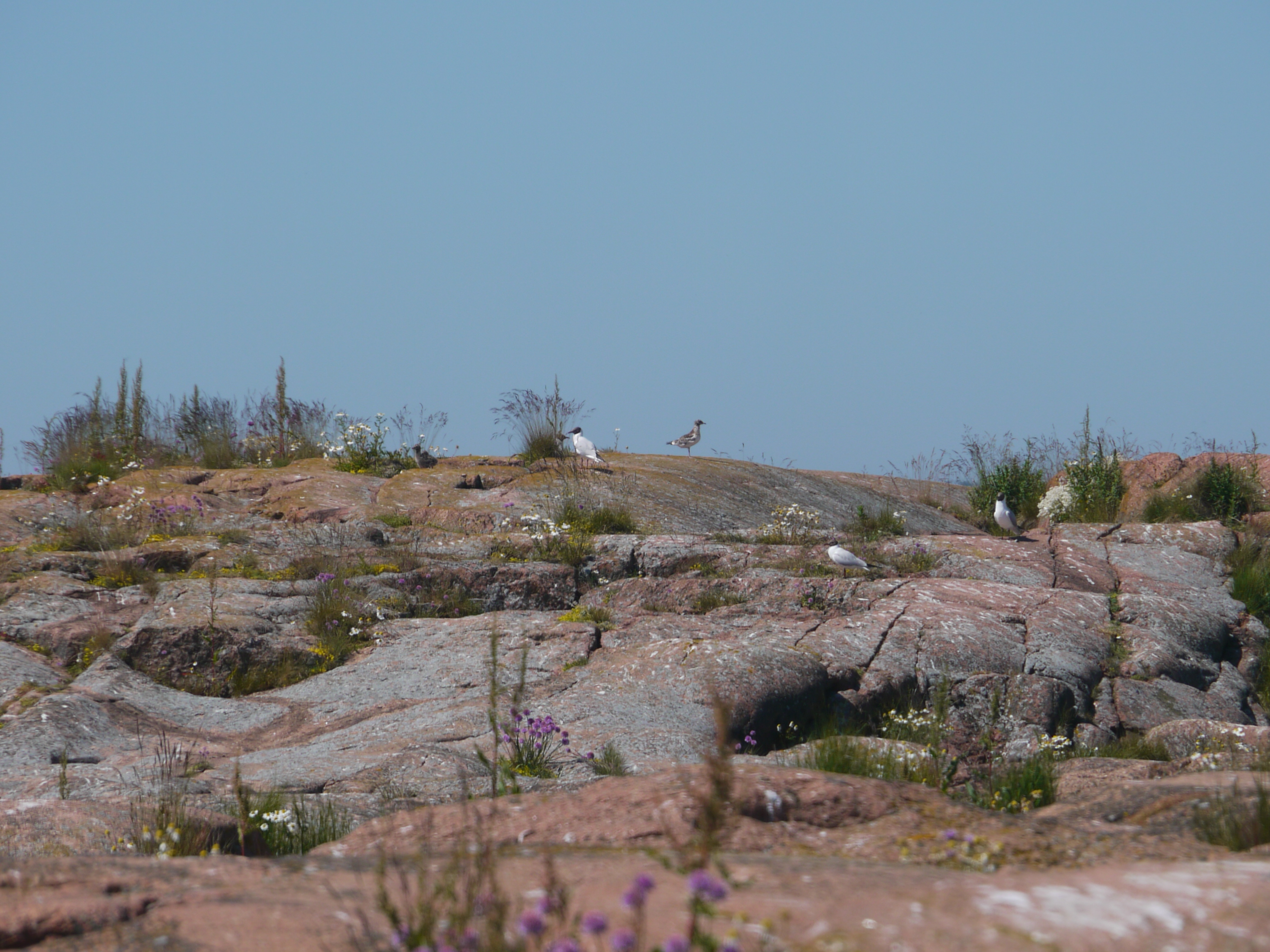 vogels op het eiland Långbådan, Geta, Åland